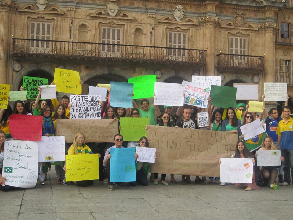 Manifestación de brasileños en Salamanca (España) en solidaridad con las protestas en Brasil de 2013